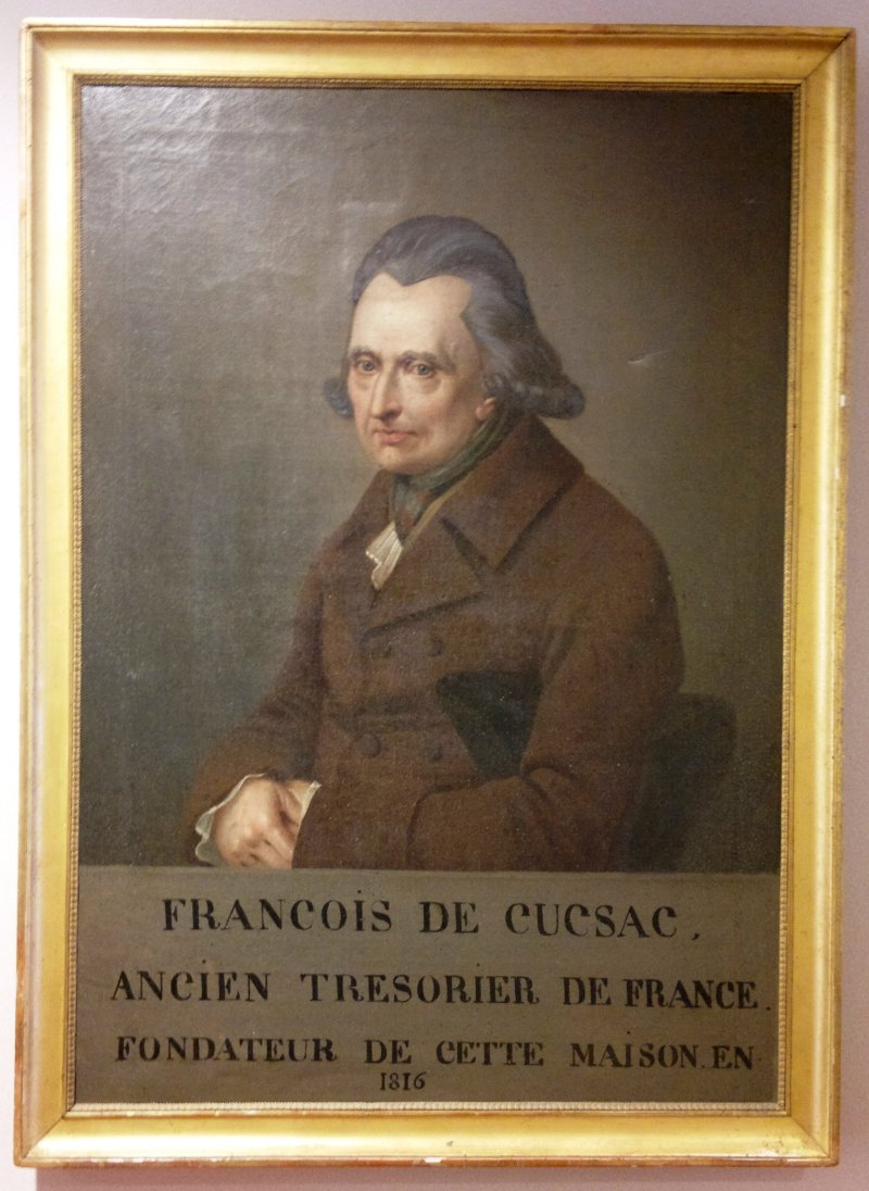 Germain-François-Marie de Cucsac, fondateur de l'hospice de Bruguières en 1816. Tableau dans le hall de la maison de retraite de Bruguières.